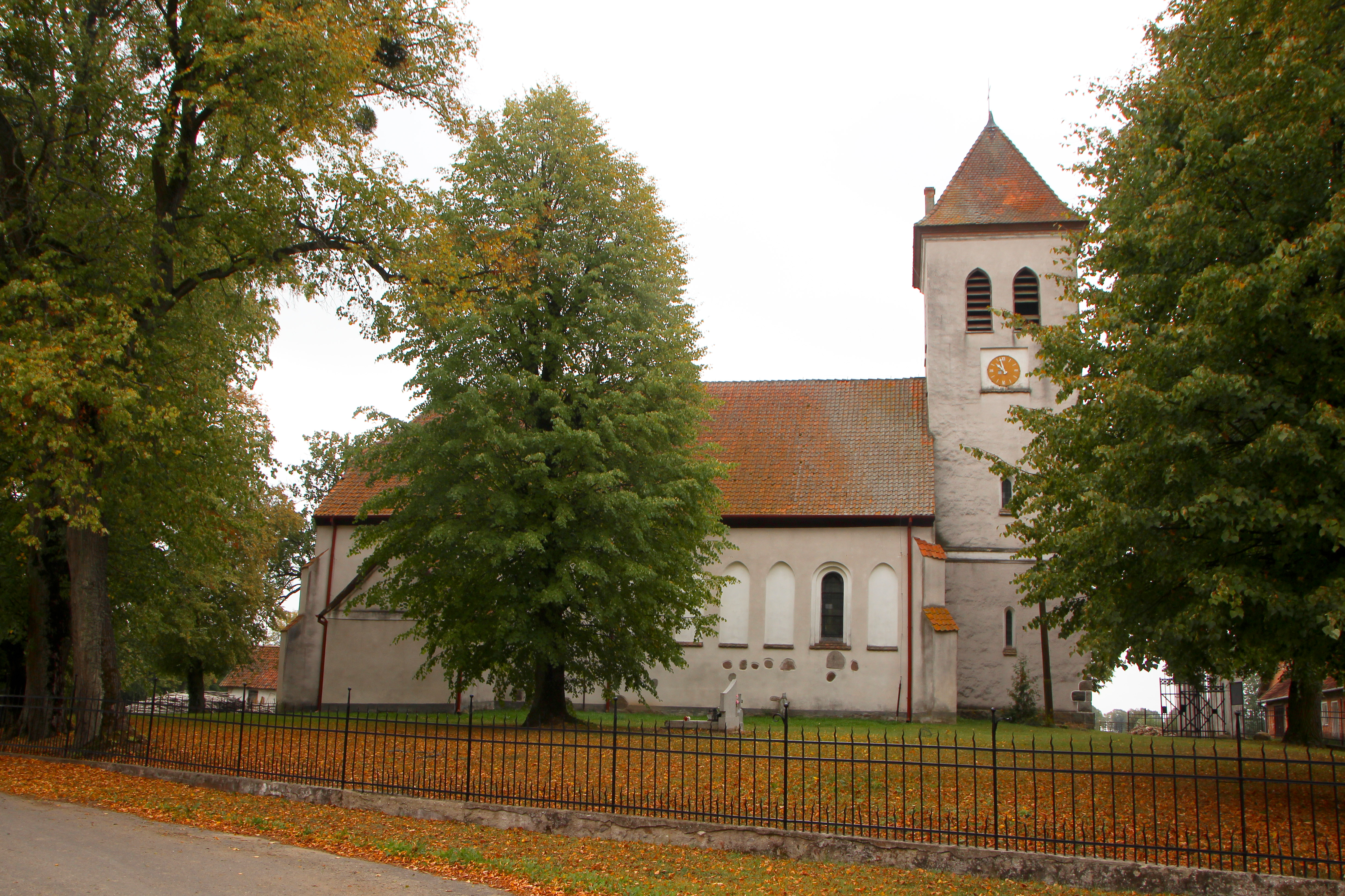 Momajny - rzymskokatolicki kościół parafialny p.w. św. Piotra Apostoła, 4 ćw. XIV, 1818-1820